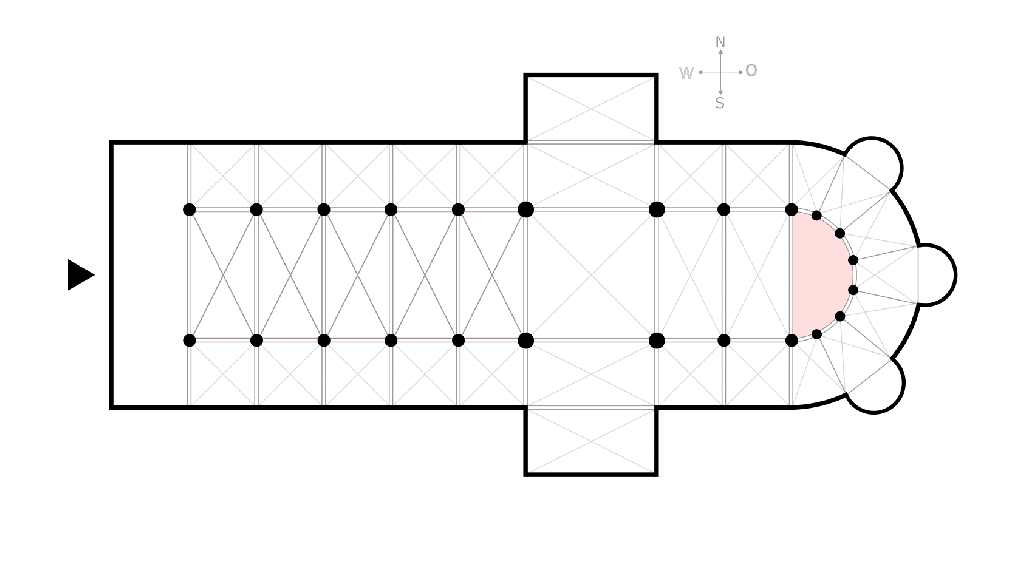 Die Apsis einer Basilika